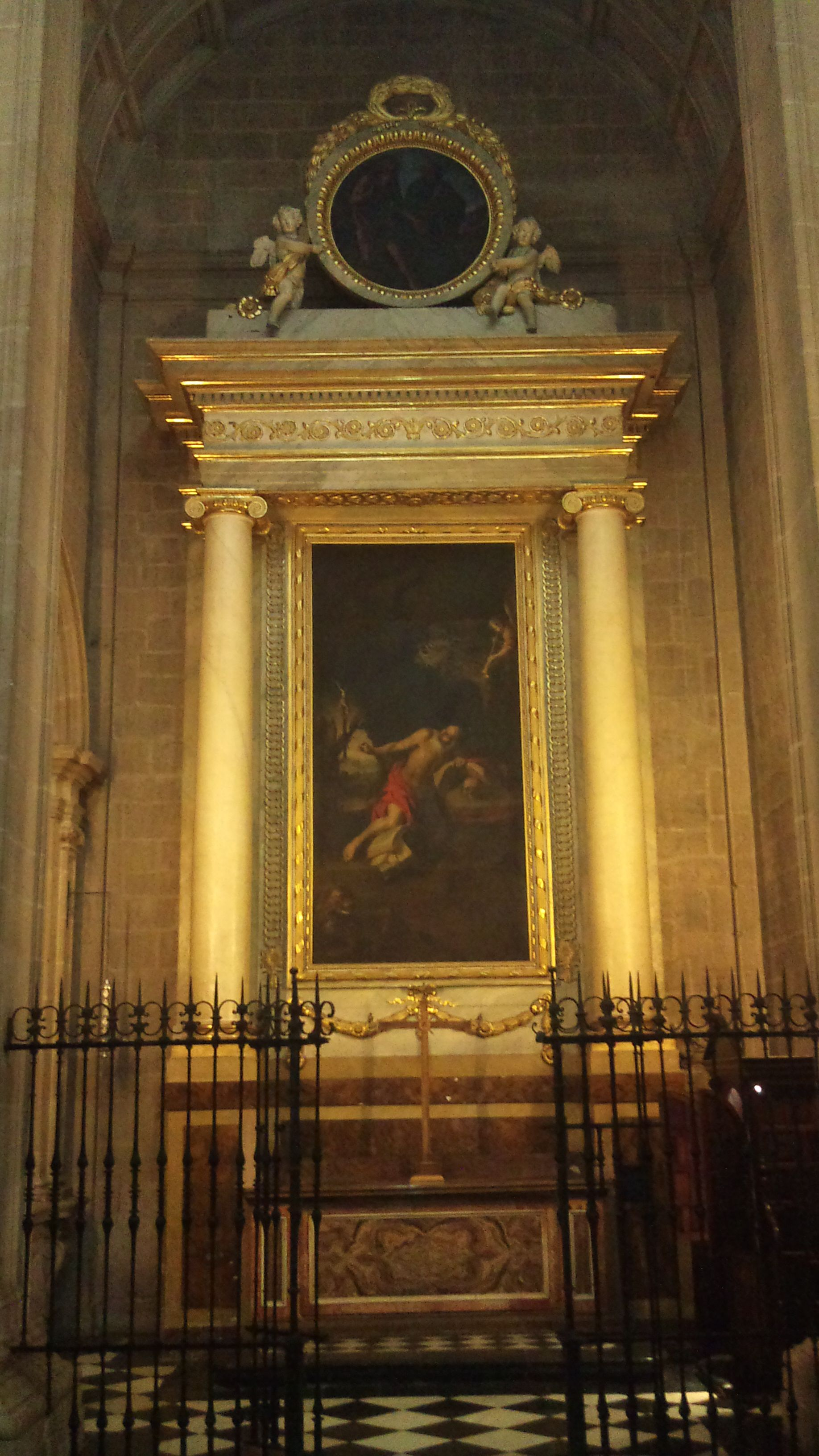 Capilla de San Jerónimo de la Catedral de Jaén. Se observa el cuadro obra de José Antolínez.